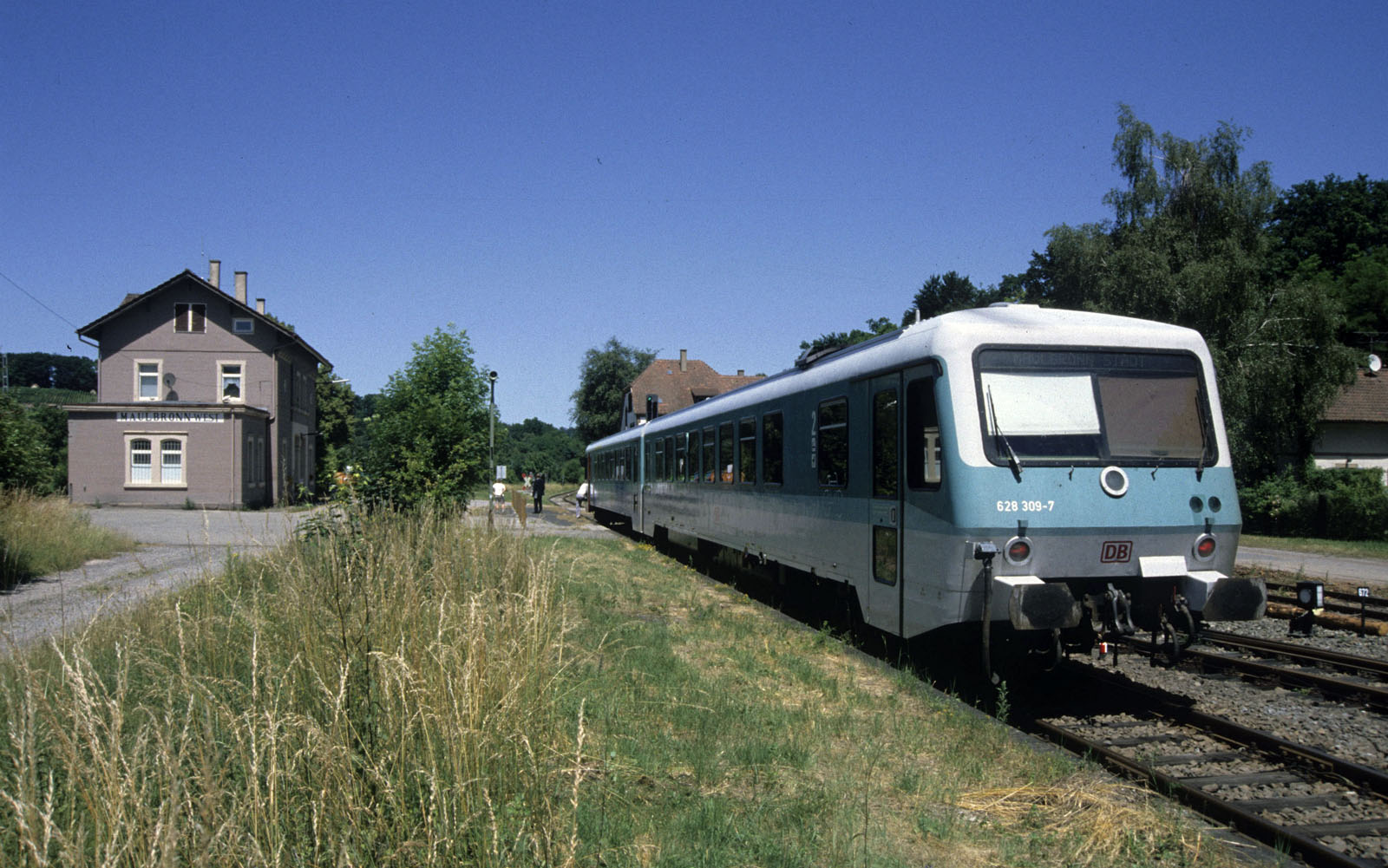 Triebwagen der Baureihe 628 als Klosterstadt-Express im Bahnhof Maulbronn West.